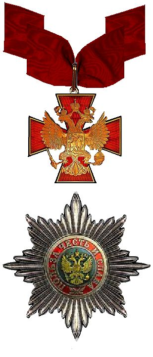 Commandeurskruis en ster